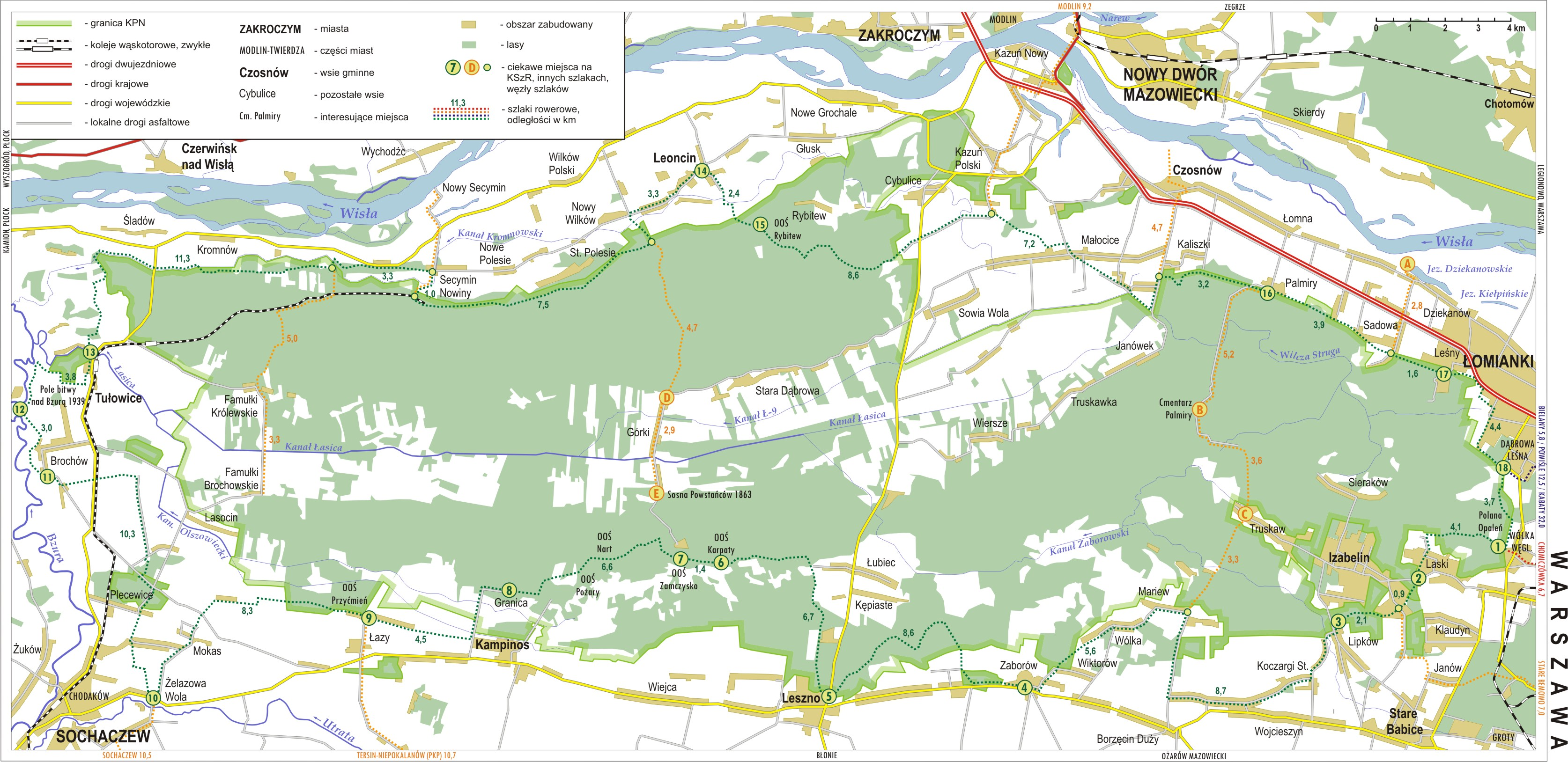 Mapa szlaków rowerowych w KPN